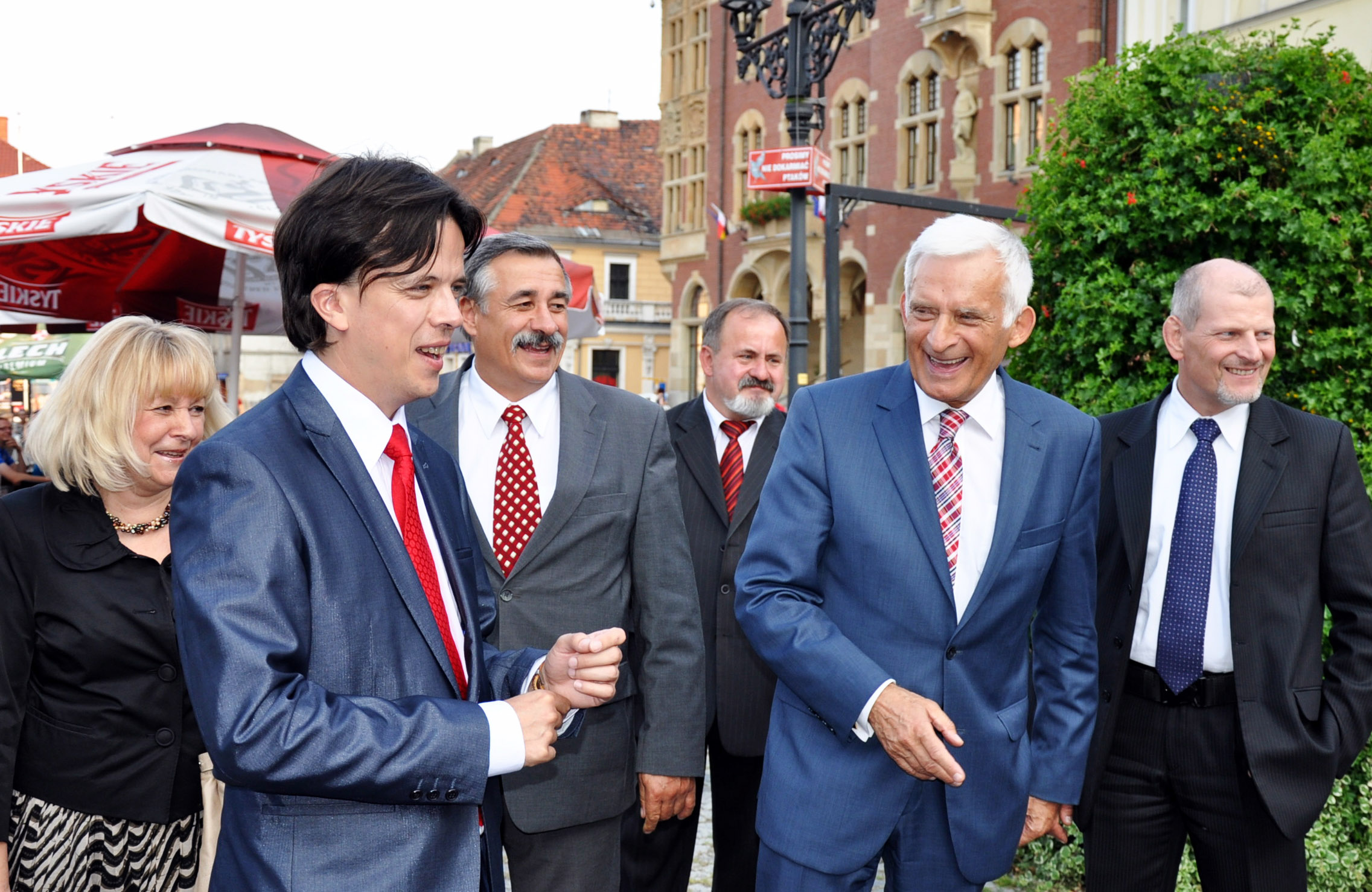 Na zaproszenie posła Tomasza Głogowskiego 1.09.2011 Tarnowskie Góry odwiedził Przewodniczący Parlamentu Europejskiego prof. Jerzy Buzek. Premier Buzek spotkał się na zamku w Starych Tarnowicach z przedstawicielami społeczności powiatu tarnogórskiego, a także rozmawiał z tarnogórzanami na Rynku w Tarnowskich Górach, gdzie od 2005 r. prowadzi z Tomaszem Głogowskim Biuro Poselskie.